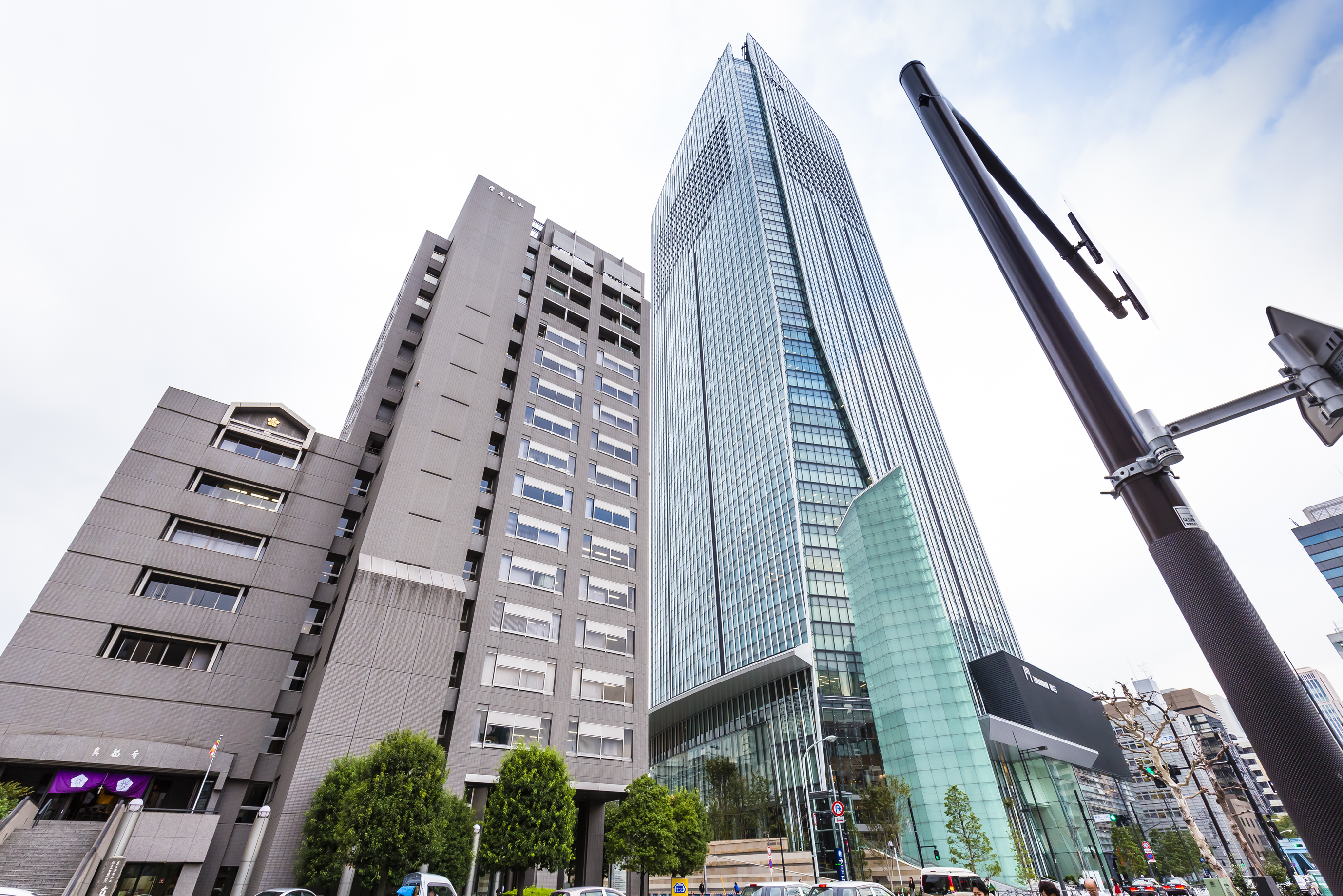 東京・虎ノ門キャンパスが設置されている愛宕東洋ビル（11階～13階）の外観（左側建物）